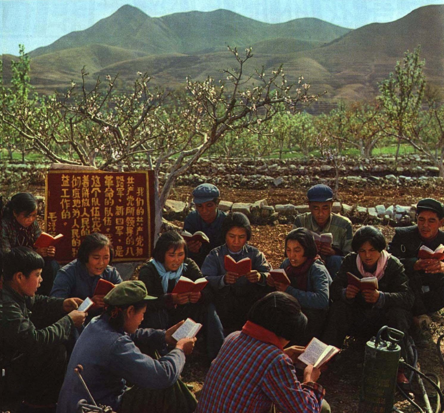 1967-07 1967年 河北遵化沙石峪